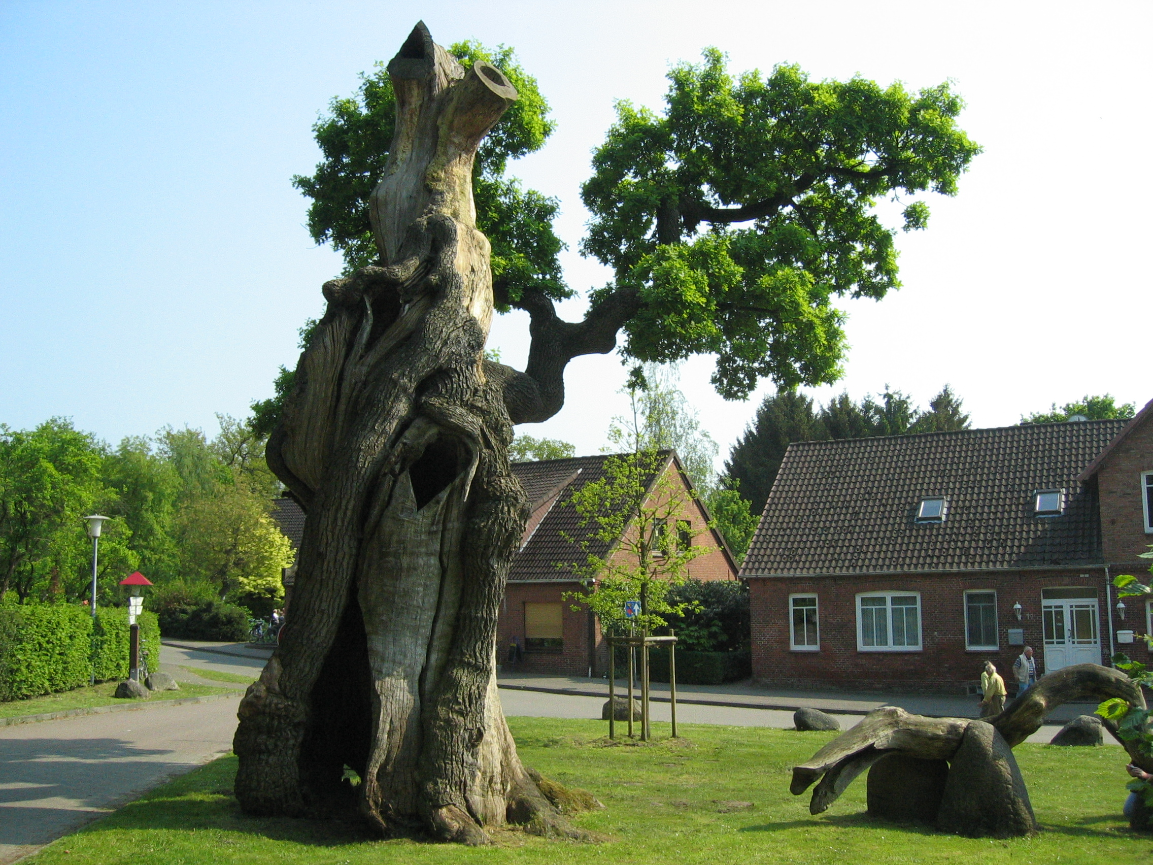 Das Naturdenkmal Dorfeiche in Dötlingen, laut Dorfchroniken über 1000 Jahre alt, im Mai 2009